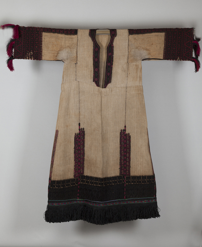 «Λινομάνικο», πουκάμισο Καραγκούνας παλαιού τύπου Θεσσαλία. Αρχές 20ού αιώνα Συλλογή Πελοποννησιακού Λαογραφικού Ιδρύματος, Ναύπλιο / 1976.6.633